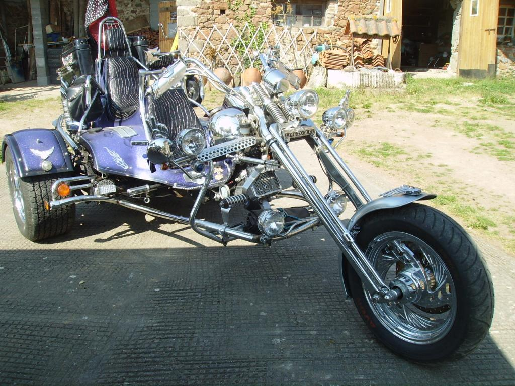 trike chopper et look Harley Davidson de marque CCS Trike, modèle 1996, moteur WW cox 1600 cm3 homologué initialement en Allemagne. Exemple de trike, appartenant à Luigi Vignola de Coulonges (79), ayant fait l'objet d'une procédure individuelle d'homologation en France qui a finalement aboutie à la classification dans la catégorie MT3 (moto) et non dans L5e, après un an de procédure, le 30 juillet 2008.